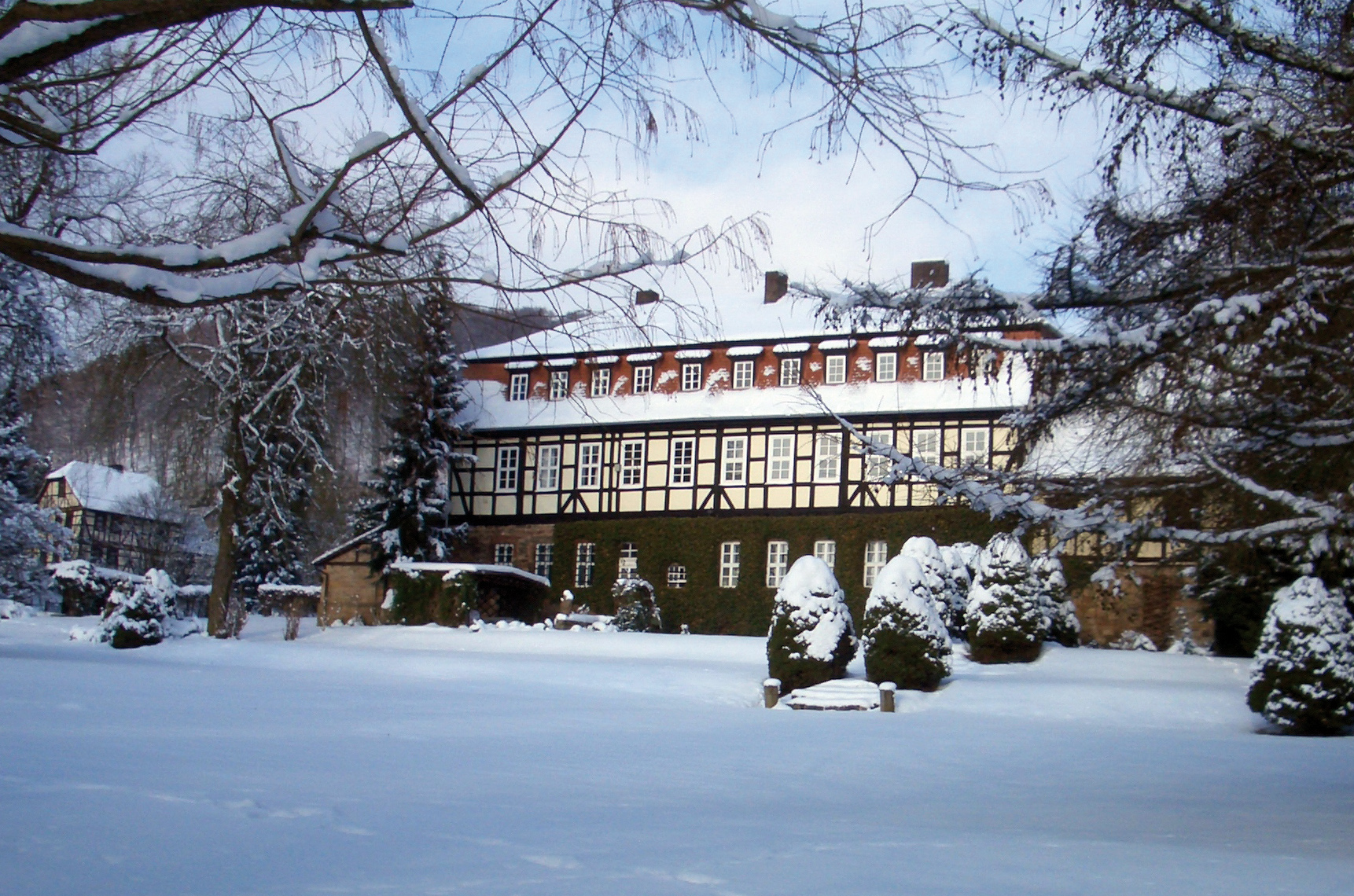 Markershausen Parkseite.